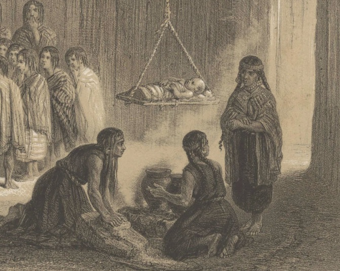 Escena en una Ruca en el Atlas de la Historia Física y Política de Chile, Tomo Primero. Claudio Gay (1854)